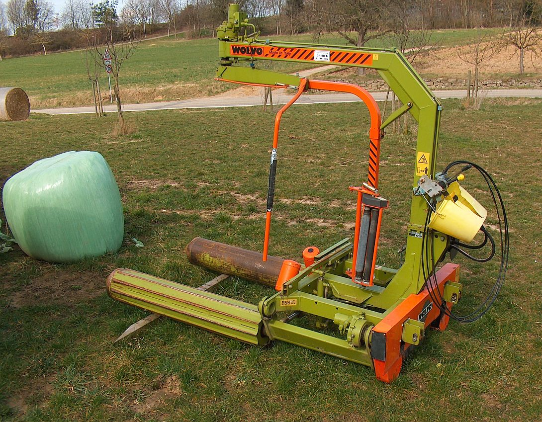 Wolvo-Ballenwickelgerät FW 12